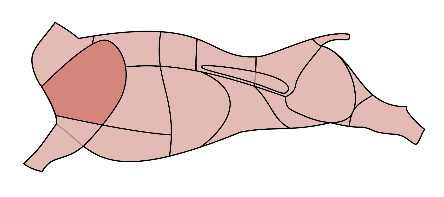 Rinderschulter.